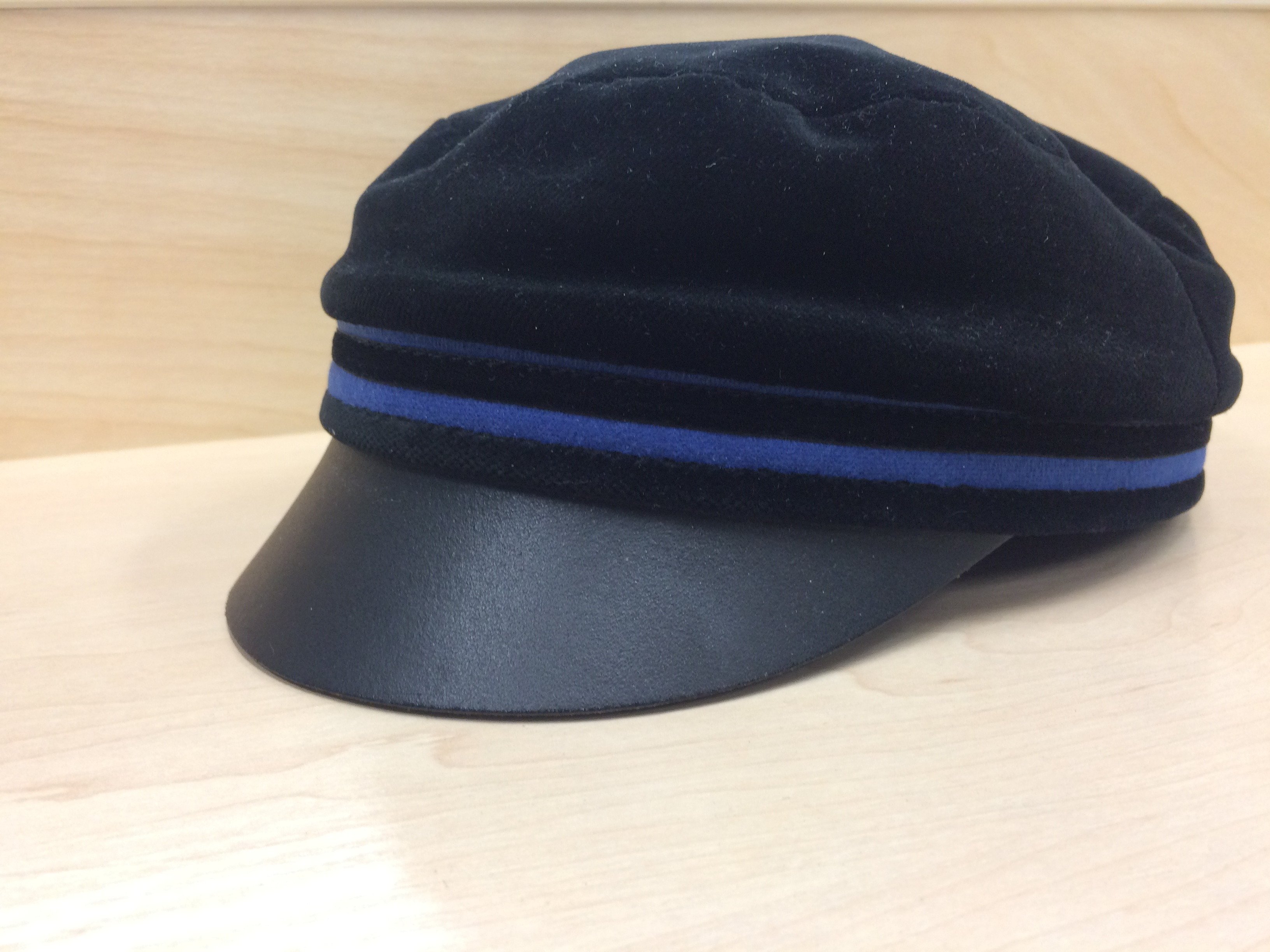 Otepää Gümnaasiumi koolimüts